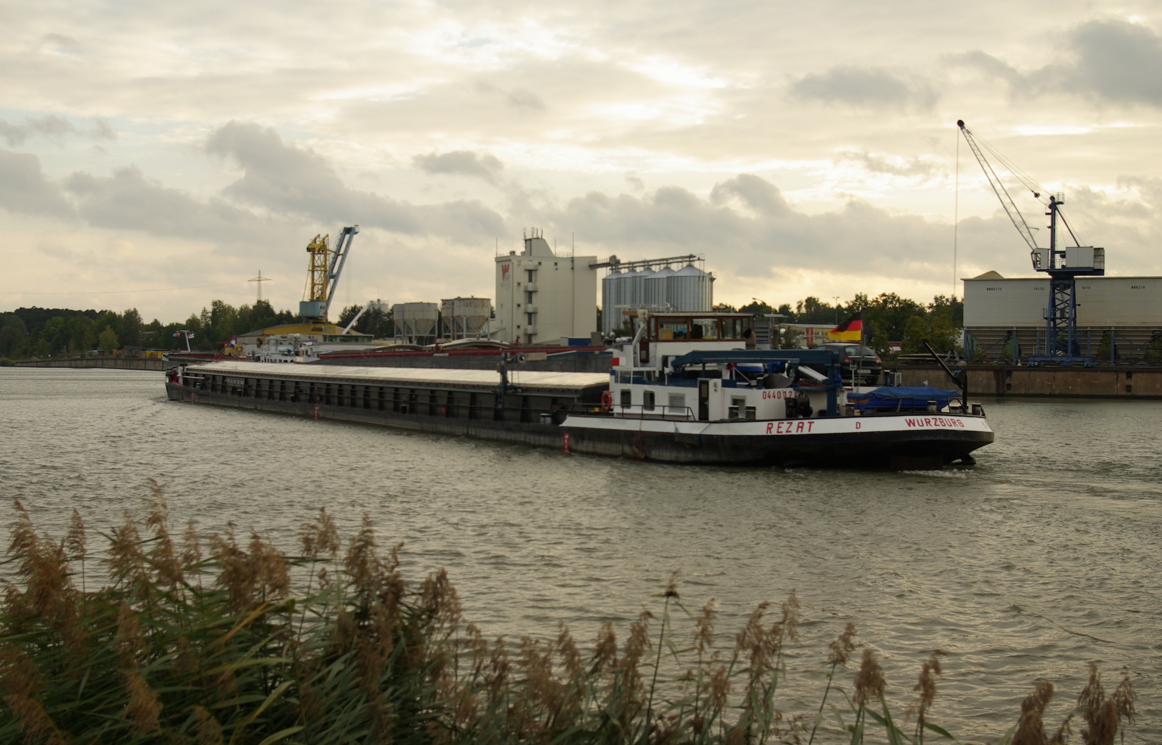 Transportschiff vor dem Hafen Erlangen